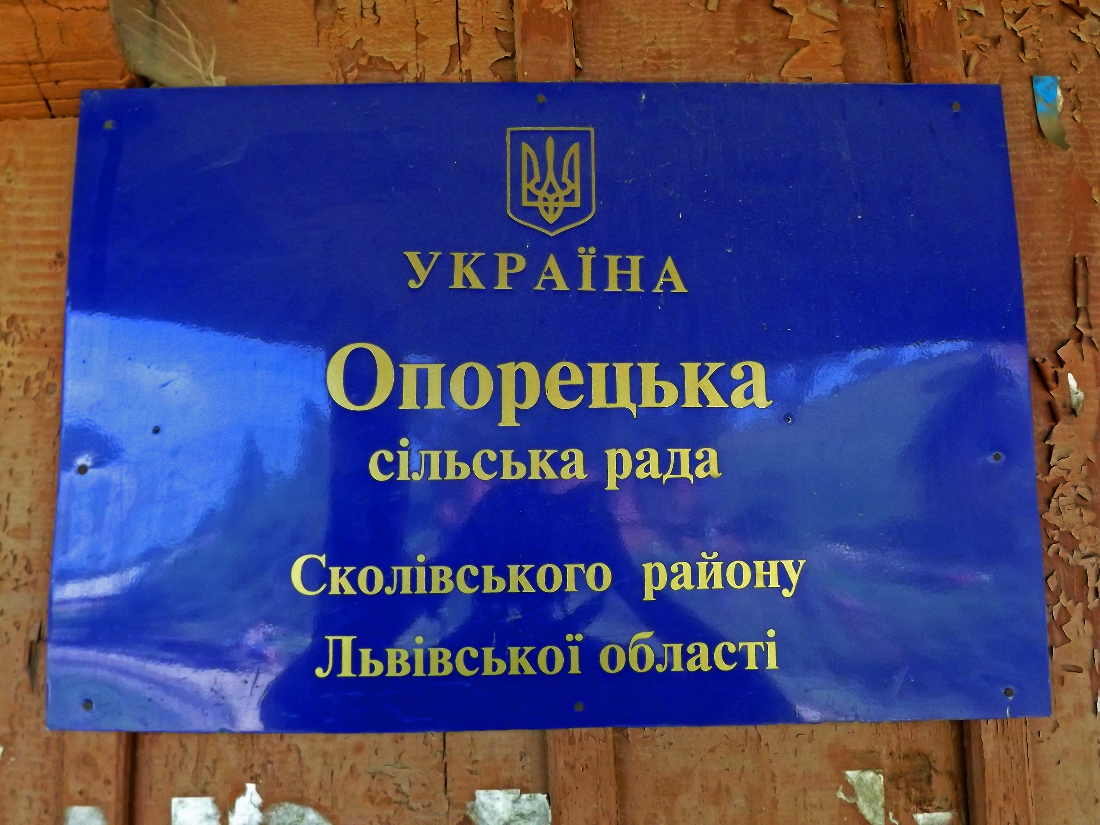 Сільська рада в селі Опорець (Сколівський район, Львівська область), серпень 2015 року